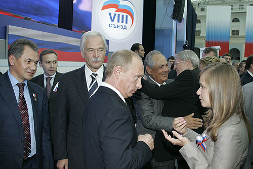 1 октября 2007 года. Москва, Гостиный двор. Владимир Путин с делегатами съезда партии «Единая Россия».